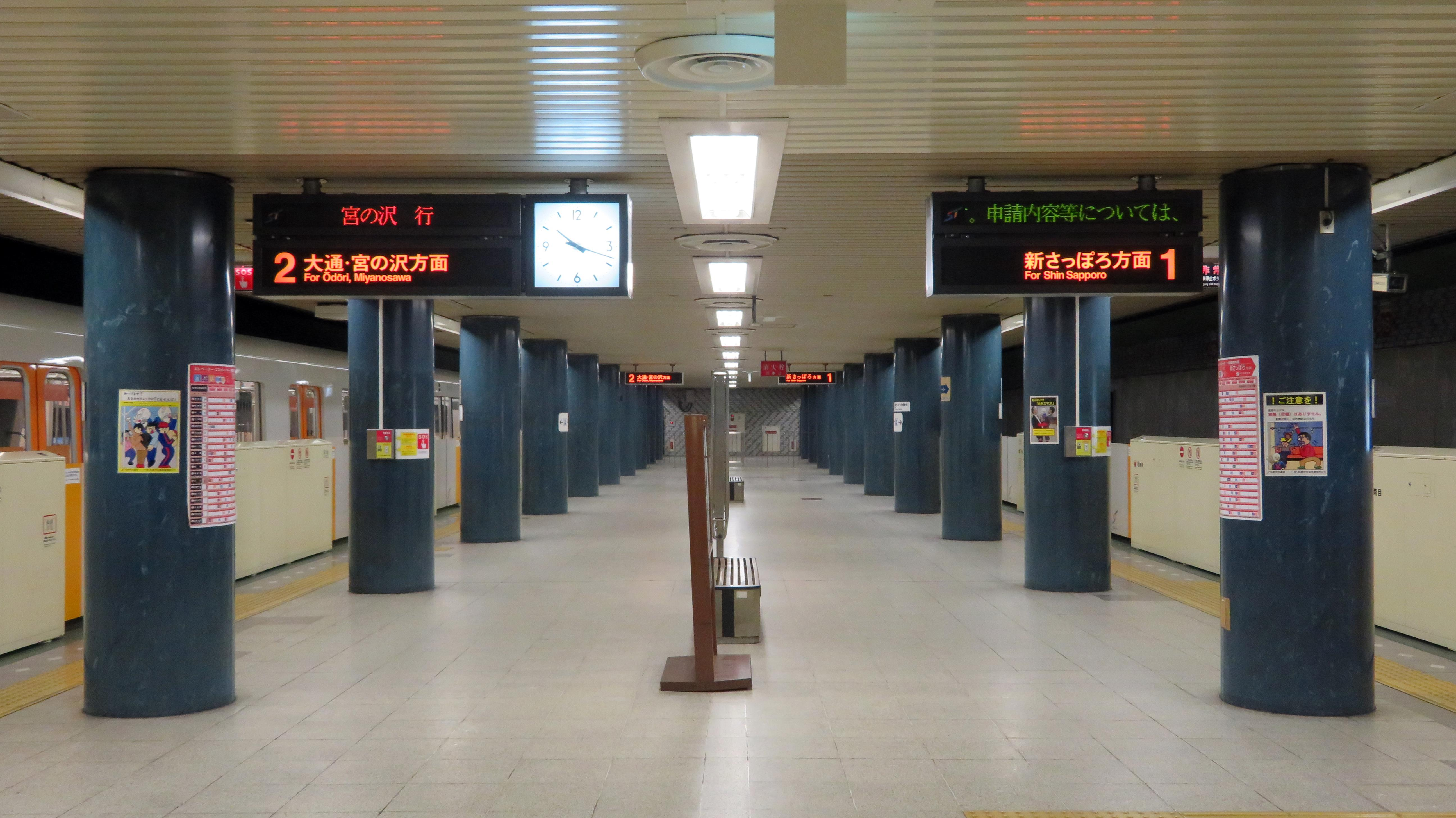 地下鉄白石駅ホーム